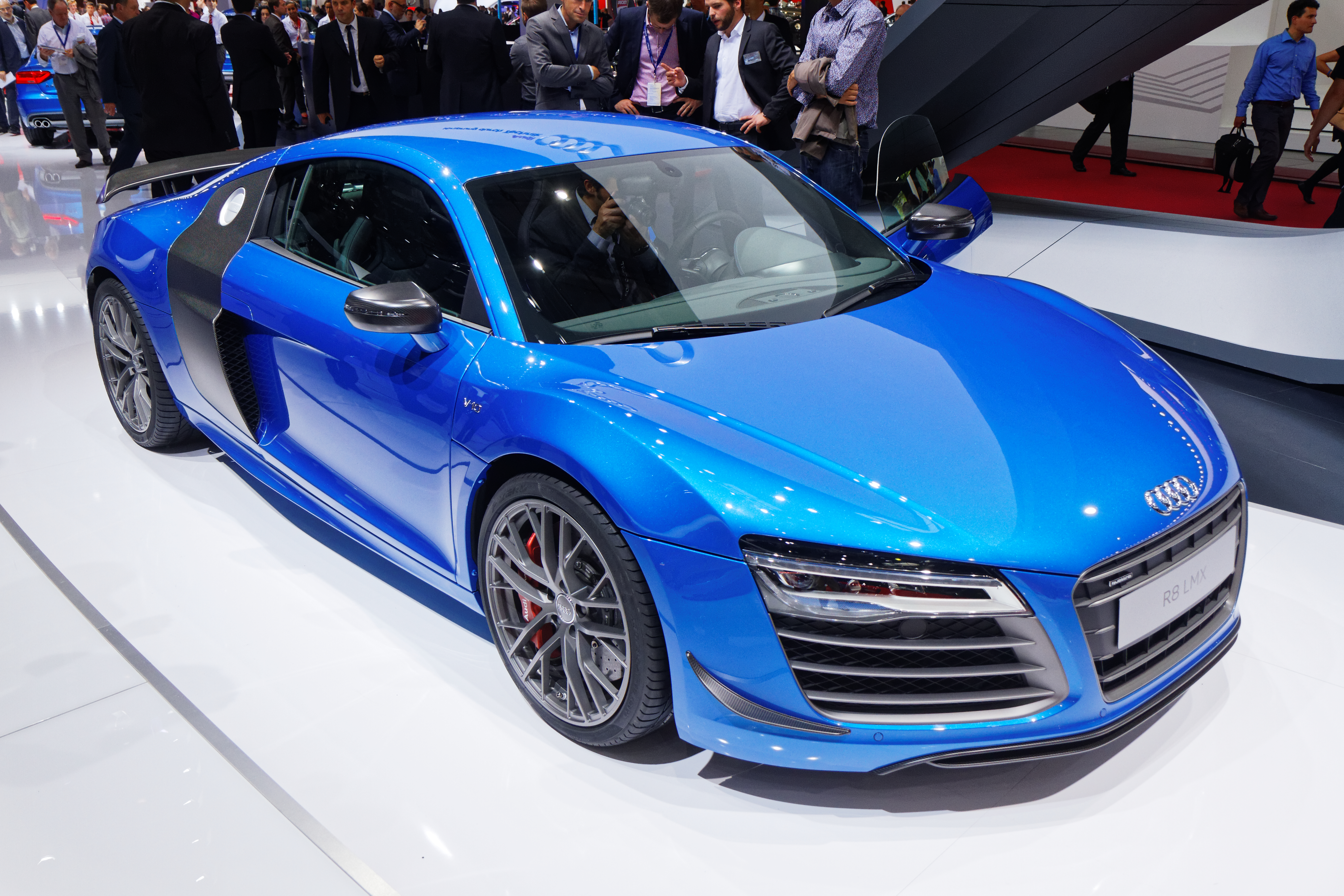 Une Audi R8 LMX présentée lors du mondial de l'automobile de Paris 2014.